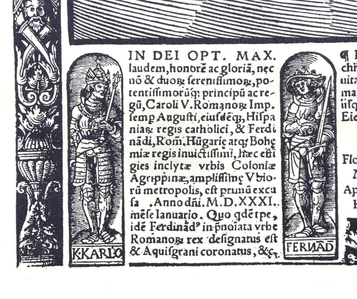 Holzschnitt: Woensam Detail aus dem Textfeld Druckstock 1 (1531)